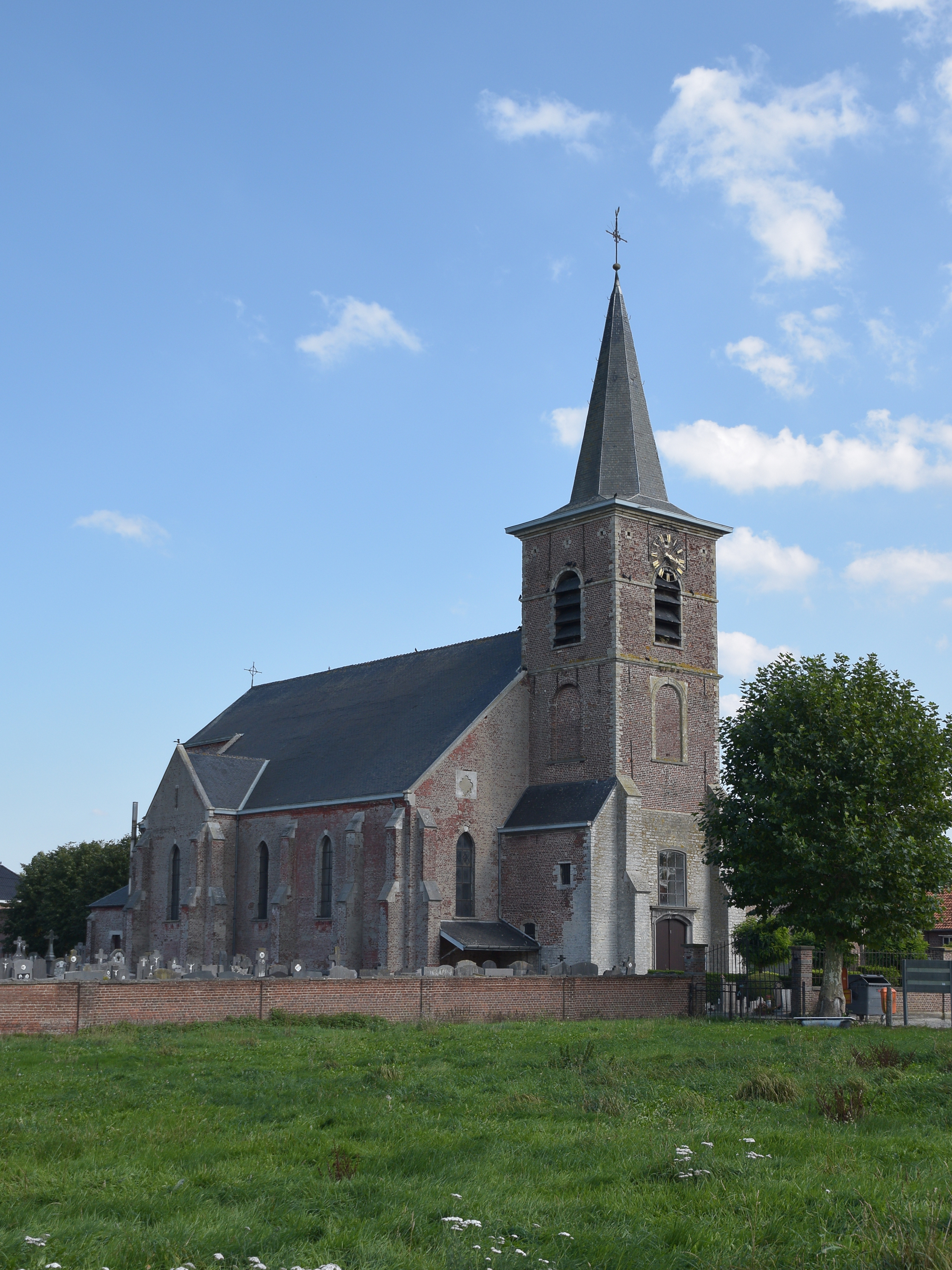 Kerk Rossem